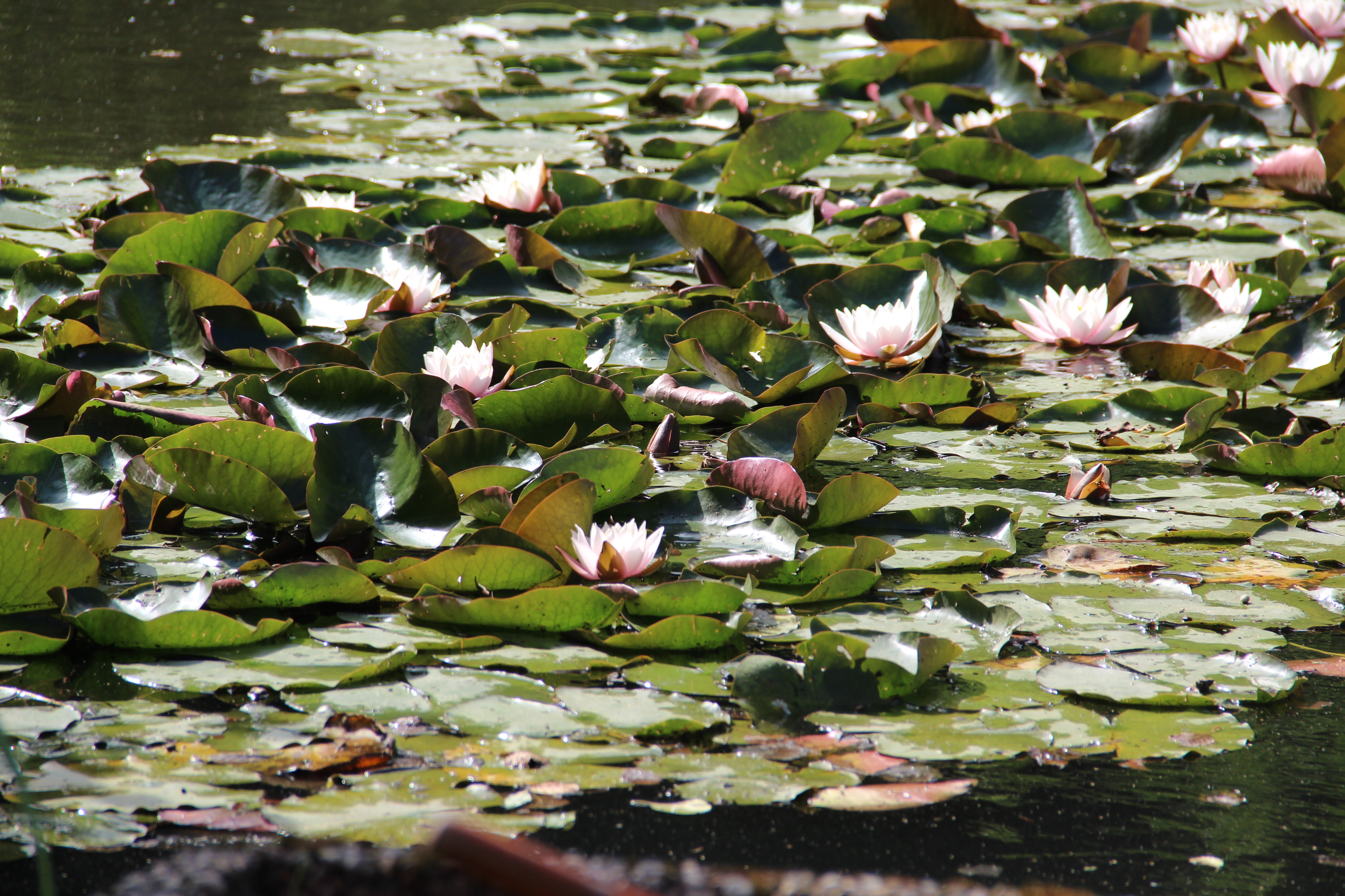 Dammen